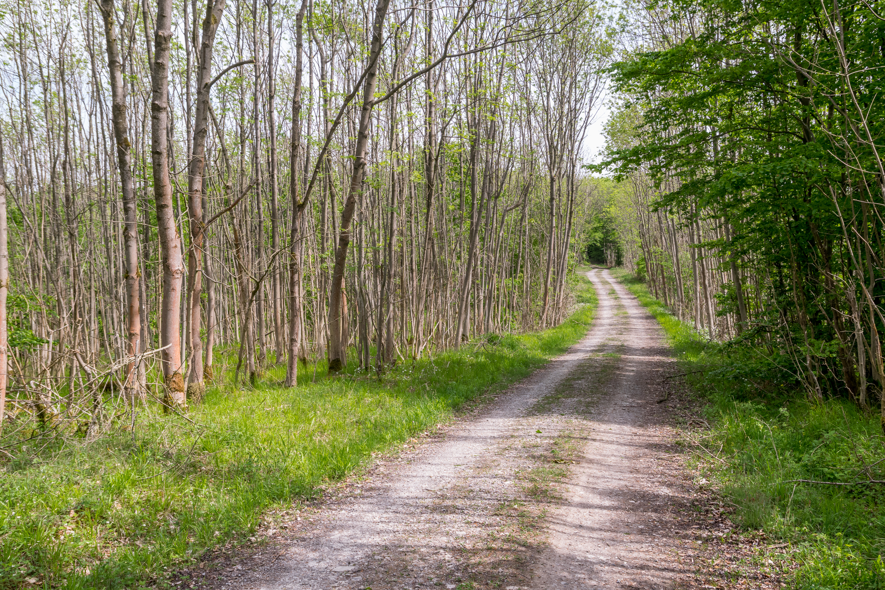 Naturschutzgebiet Schildberg, Lügde, Kreis Lippe